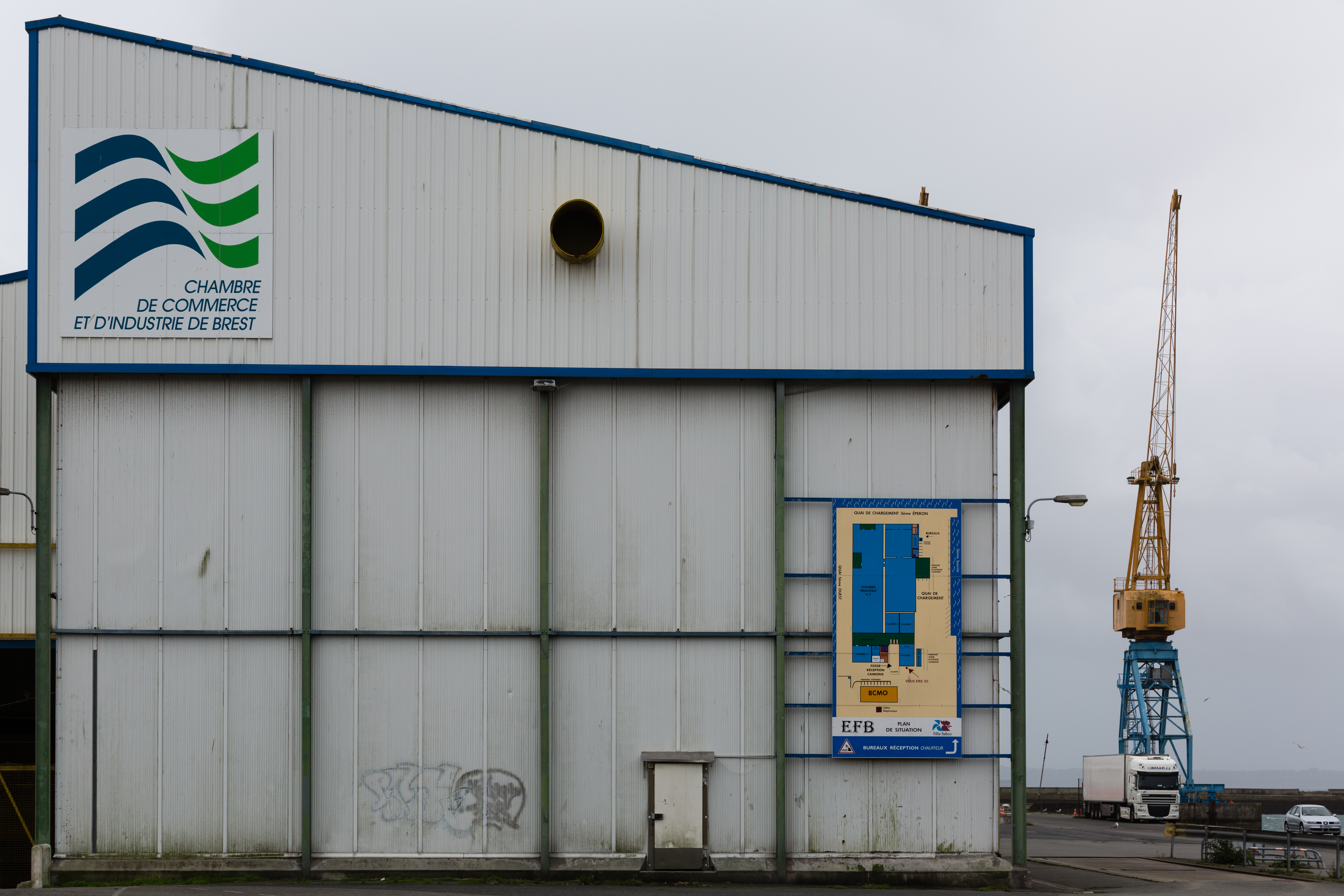 Le port de commerce de Brest (France).